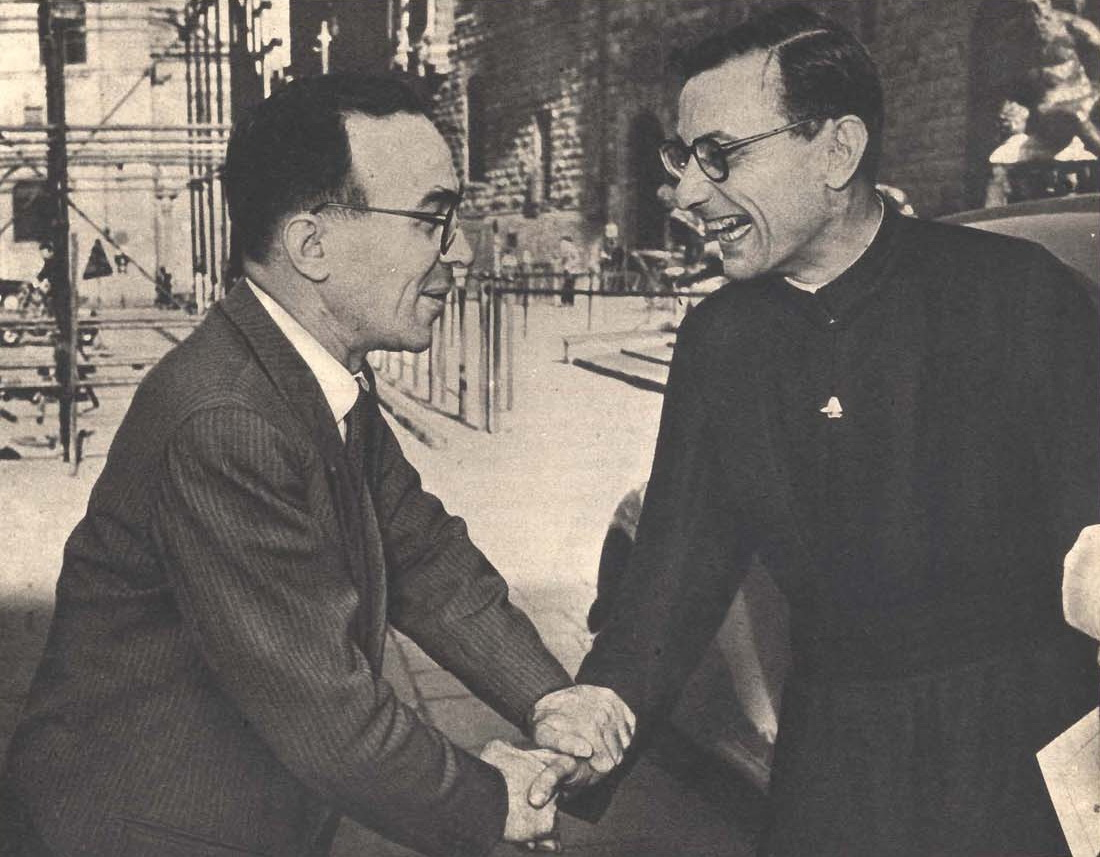 Italian politician Giorgio La Pira and Father Jean Daniélou in Piazza della Signoria, Florence, June 1953